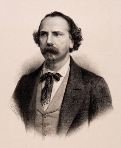 Emilio Naudin (1823-1890)